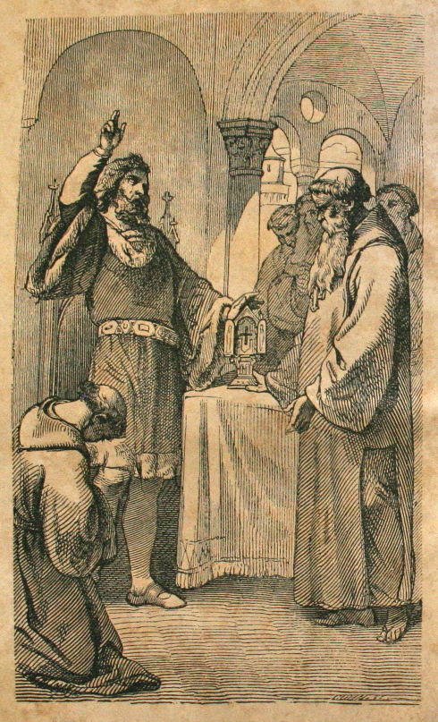 Leopold V. schenkt 1188 dem Stift Heiligenkreuz die Kreuzreliquie, die er im Heiligen Land erworben hat.